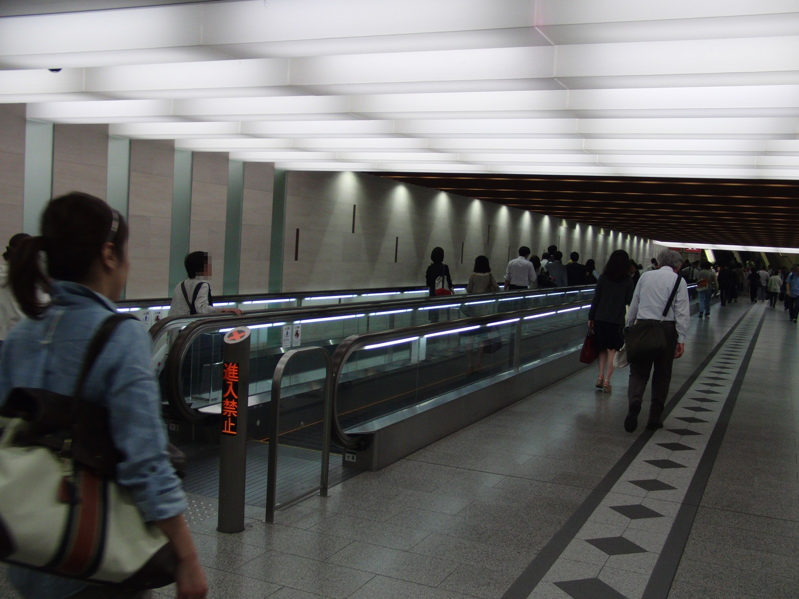 梅田駅の動く歩道を撮影